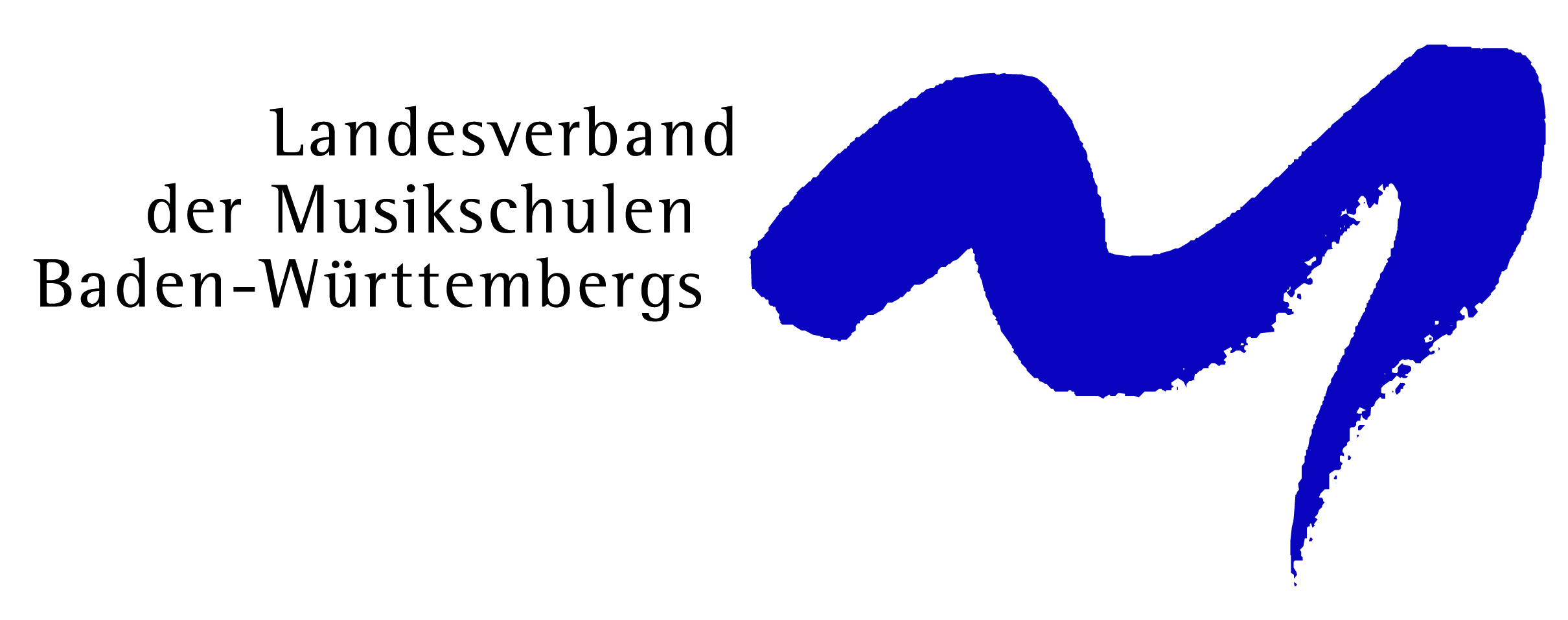 Logo des Landesverbandes der Musikschulen Baden-Württembergs e.V.